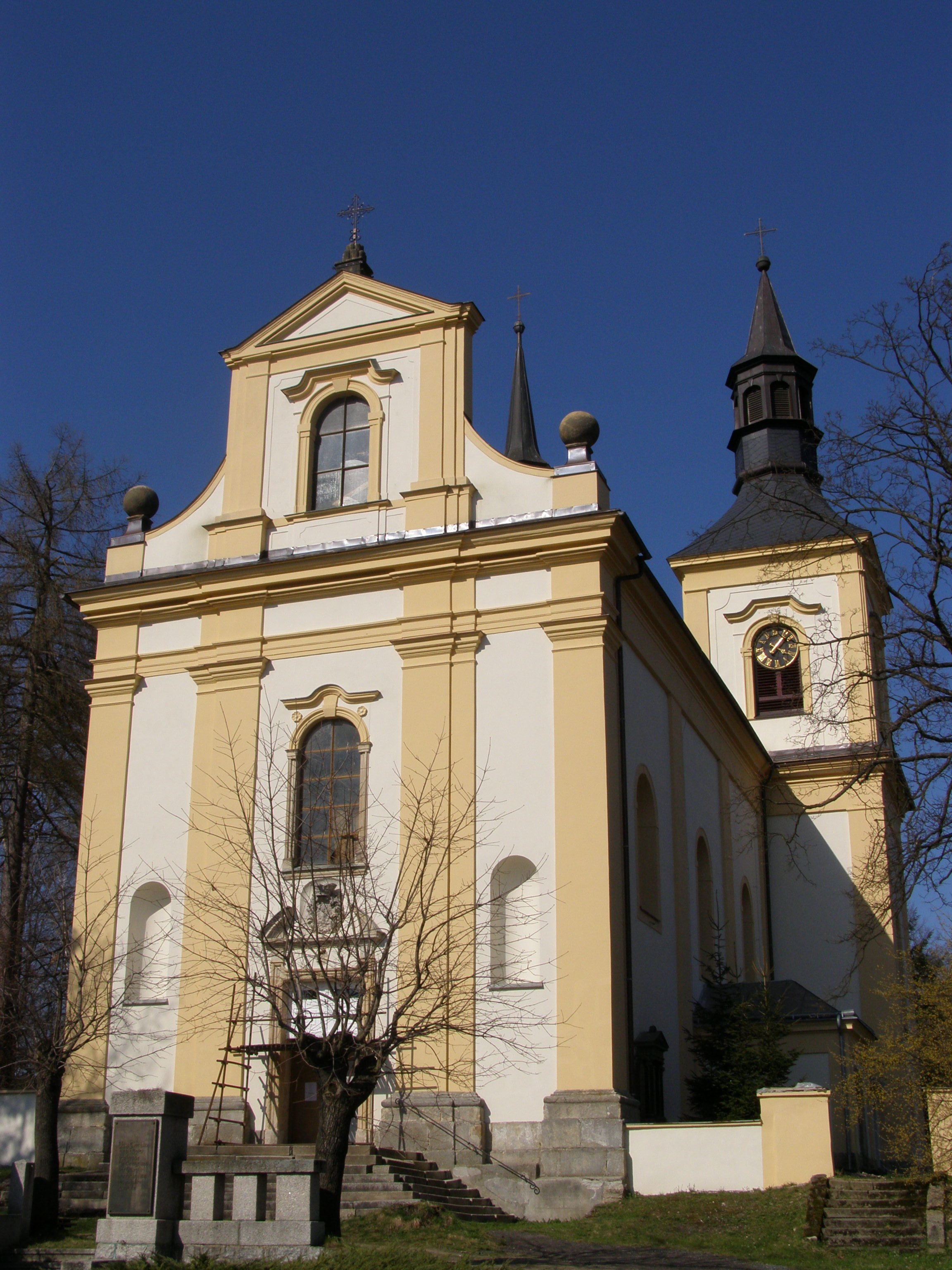 Kostel sv. Václava (Rychnov u Jablonce nad Nisou)